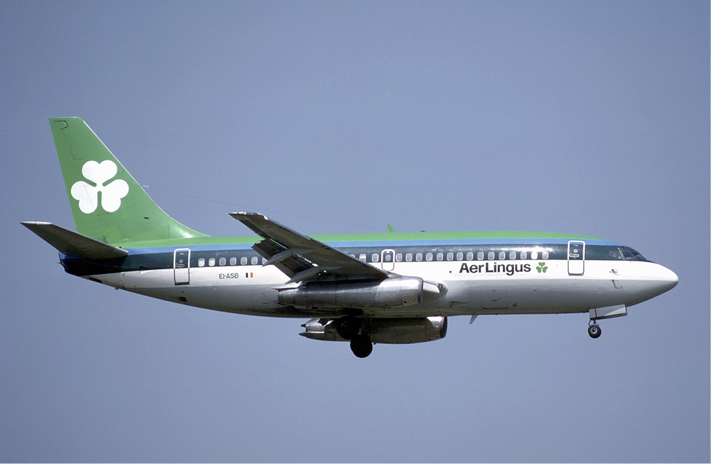 Aer Lingus Boeing 737-200